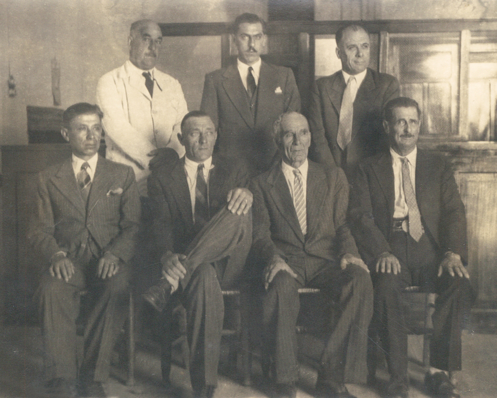 PRIMERA JUNTA DE FOMENTO MUNICIPAL Arriba (izq. a der.): Conc. Carlos Francisco Garzia (UCR), Conc. Faustino Ramón Baldo (PJ), Conc. Julio Leiva Soler (UCR). Abajo (izq. a der.): Conc. Evaristo Canteros (PJ), 1er. Intendente Enrique “Cotuna” Godoy (PJ), Conc. Miguel Demartini (PJ), Conc. Víctor Arias (PJ).